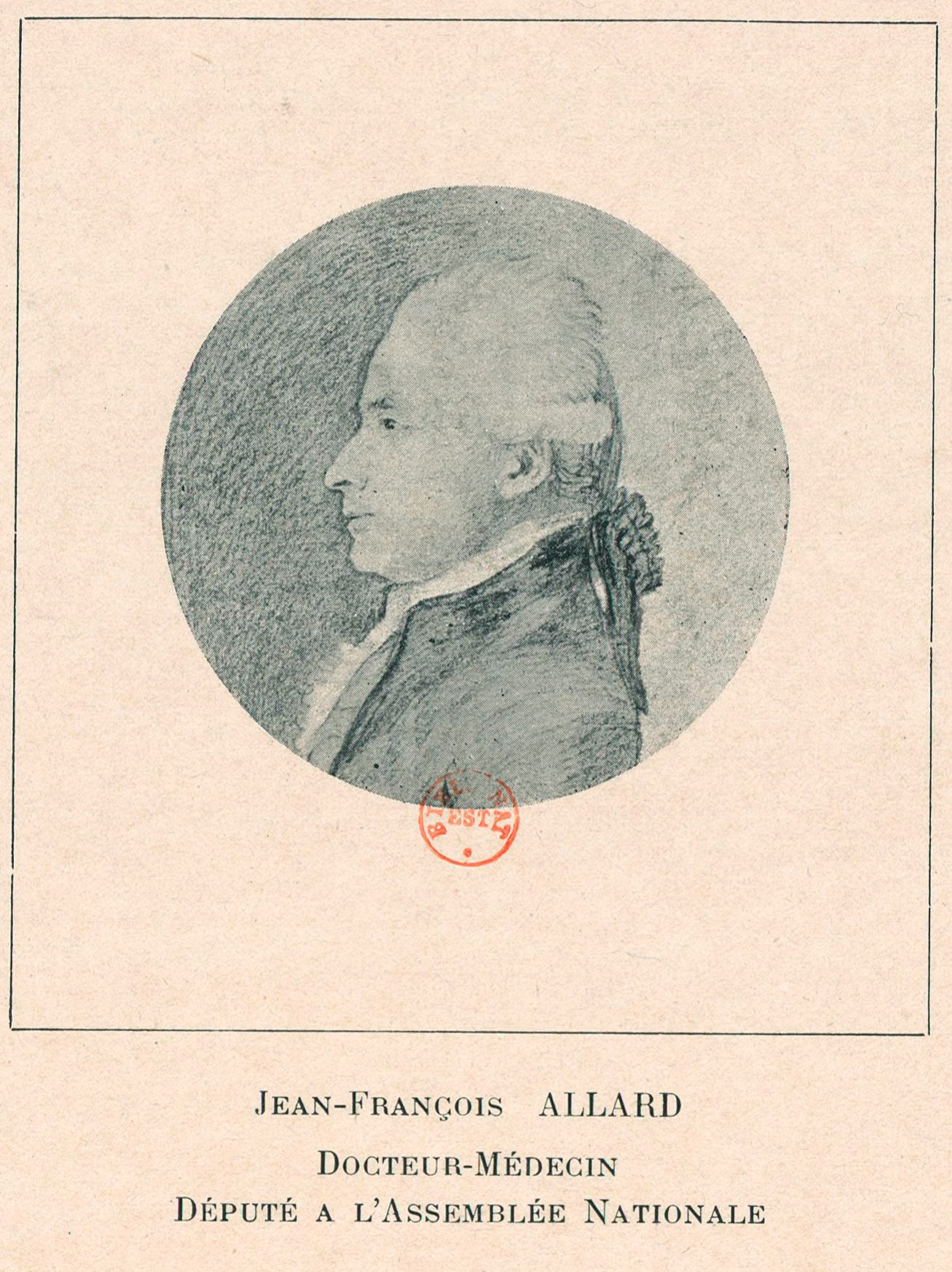 Portrait du médecin Louis-François Allard (et non Jean-François) comme indiqué en légende de l'image. Député du tiers aux États généraux par la sénéchaussée de l'Anjou.